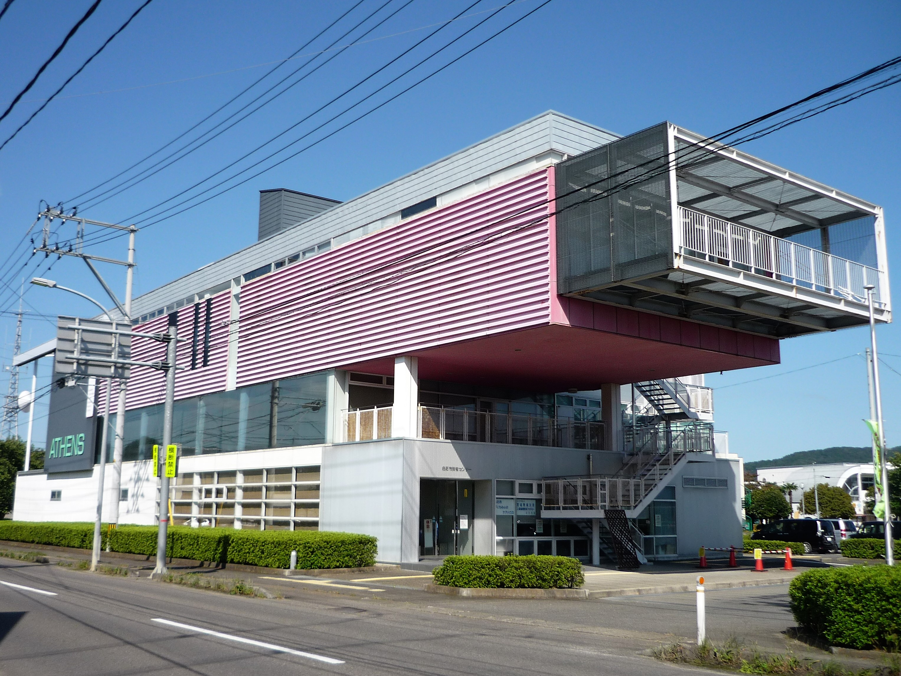 白石市情報センター（愛称：アテネ） Panasonic Lumix DMC-FS3